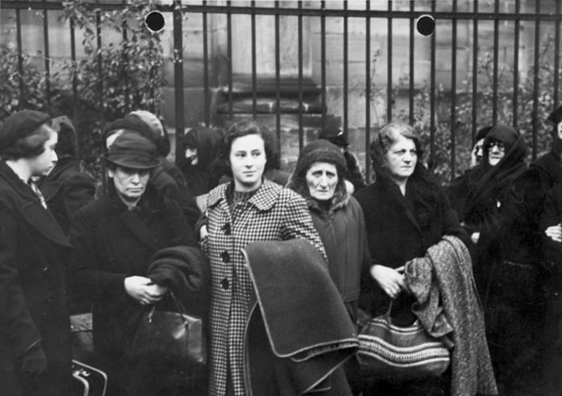 Ausweisung d. poln. Juden aus Nbg. Freitag d. 28. Okt. 1938 H. Großberger, Nürnberg Bildarchiv Franken